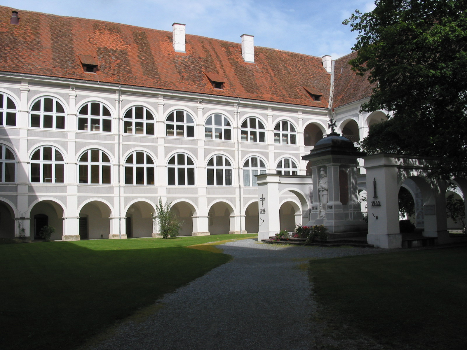 de: ehem. Stift in Pöllau, Innenhof en: former Abbey of Pöllau, courtyard